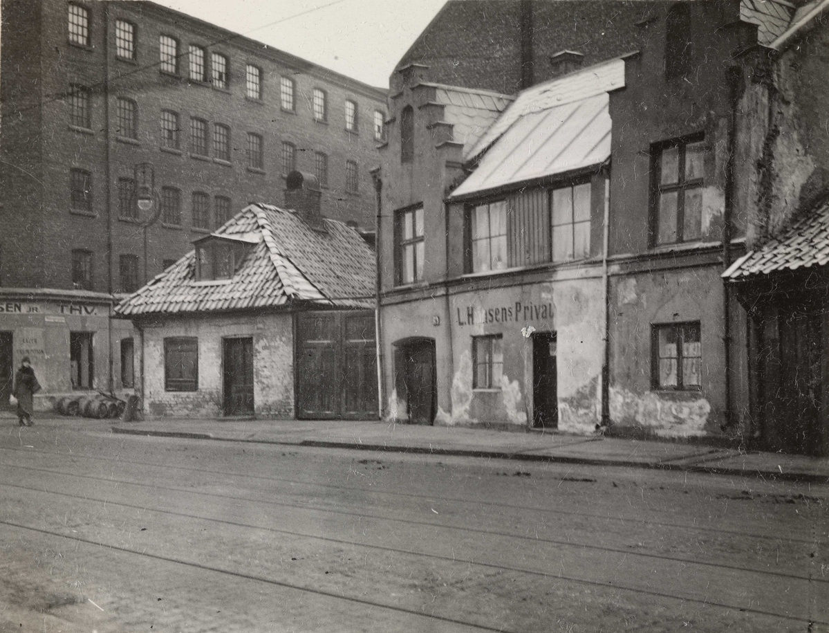 Vognmannsgata 28–30. Til venstre for nr. 30 går Vognmannsgangen. Foto: N. Engstrøm, ca. 1910–20. Fra Byhisorisk samling hos Oslo Museum.